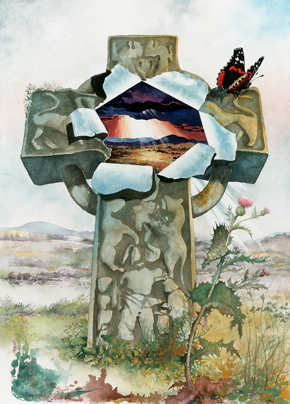 Gemälde von dem Künstlerduo Mole & Wolfrhine aus der Kunstreihe „Die nächste Generation“